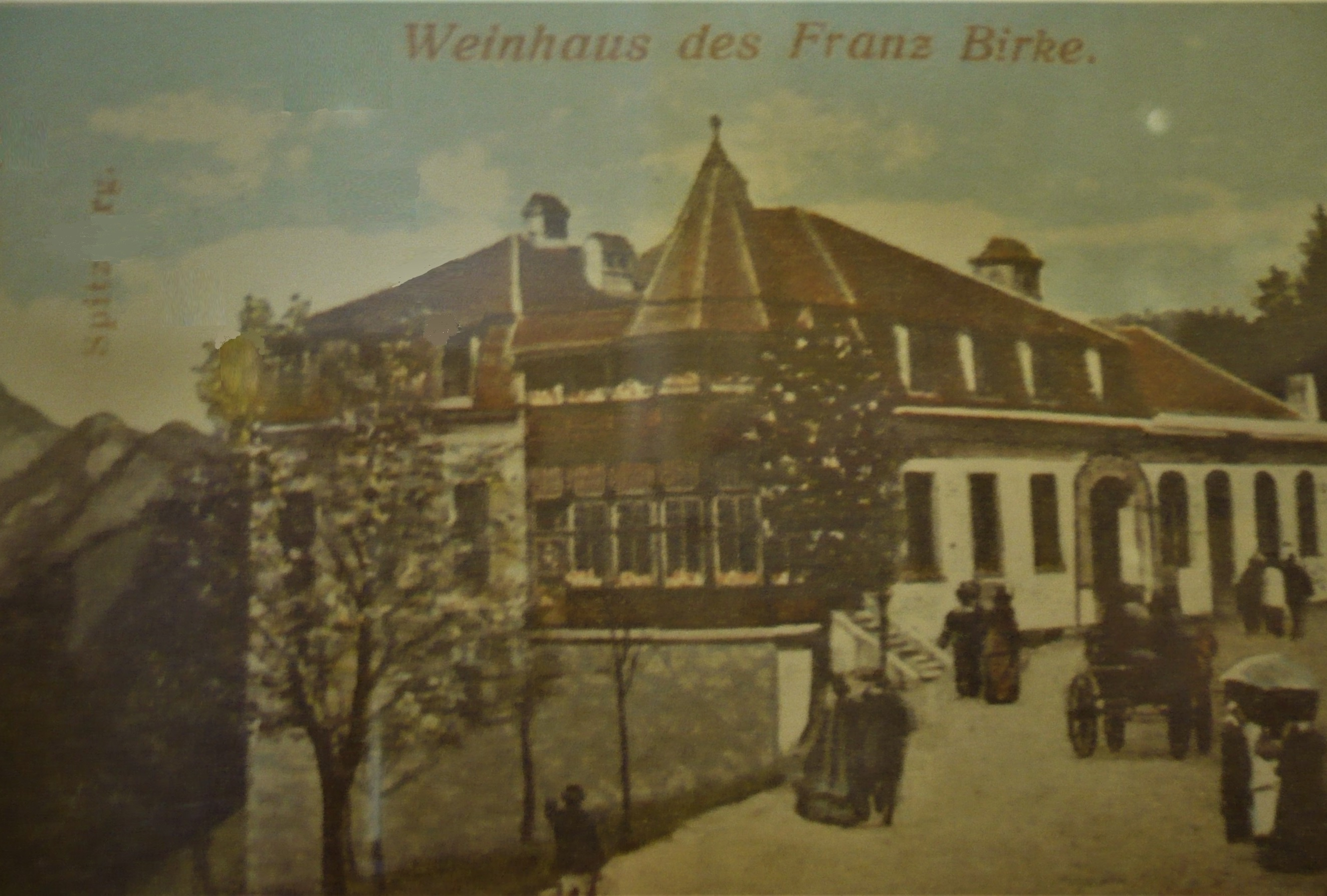 Janovicky. Zajazd Franza Birkego z 1916 r.